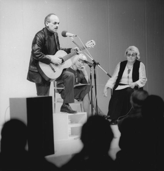 ADN-ZB Reiche 2.12.76 Berlin: Bulat Okudshawa, der in seiner sowjetischen Heimat sehr populäre Dichter, Komponist, Sänger und Gitarrist, gastierte am 2. und 1.12. und am 29.11.76 im Theater im Palast. Die Veranstaltung, von dieser kleinen Bühne und dem Verlag Volk und Welt gemeinsam organisiert, fand großen Anklang beim Publikum. Der Künstler wurde 1924 in Moskau als Sohn einer Armenierin und eines Georgiers geboren. Er veröffentlichte 1956 seine erste Gedichtsammlung, der Werke verschiedener literarischer Genres folgten. Sein historischer Roman "Merci oder die Abenteuer Schipows" soll 1978 im Verlag Volk und Welt erscheinen.